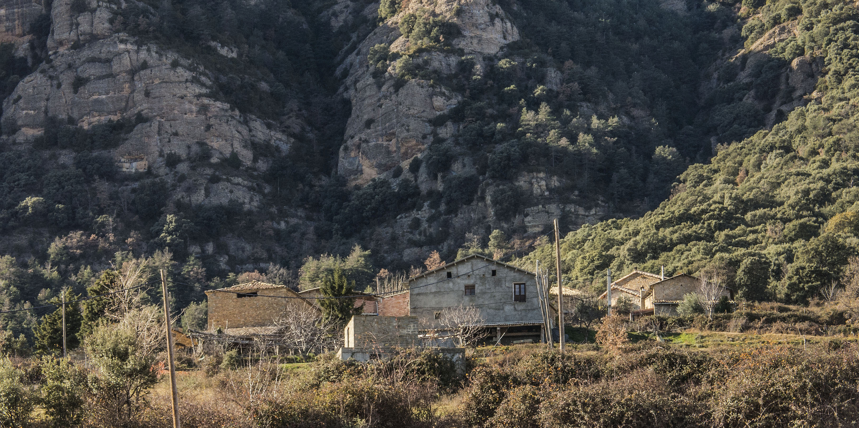 És un llogaret del municipi d'Isàvena, a la Baixa Ribagorça de l'Aragó, situat al vessant NE de la Serra d'Esdolomada.